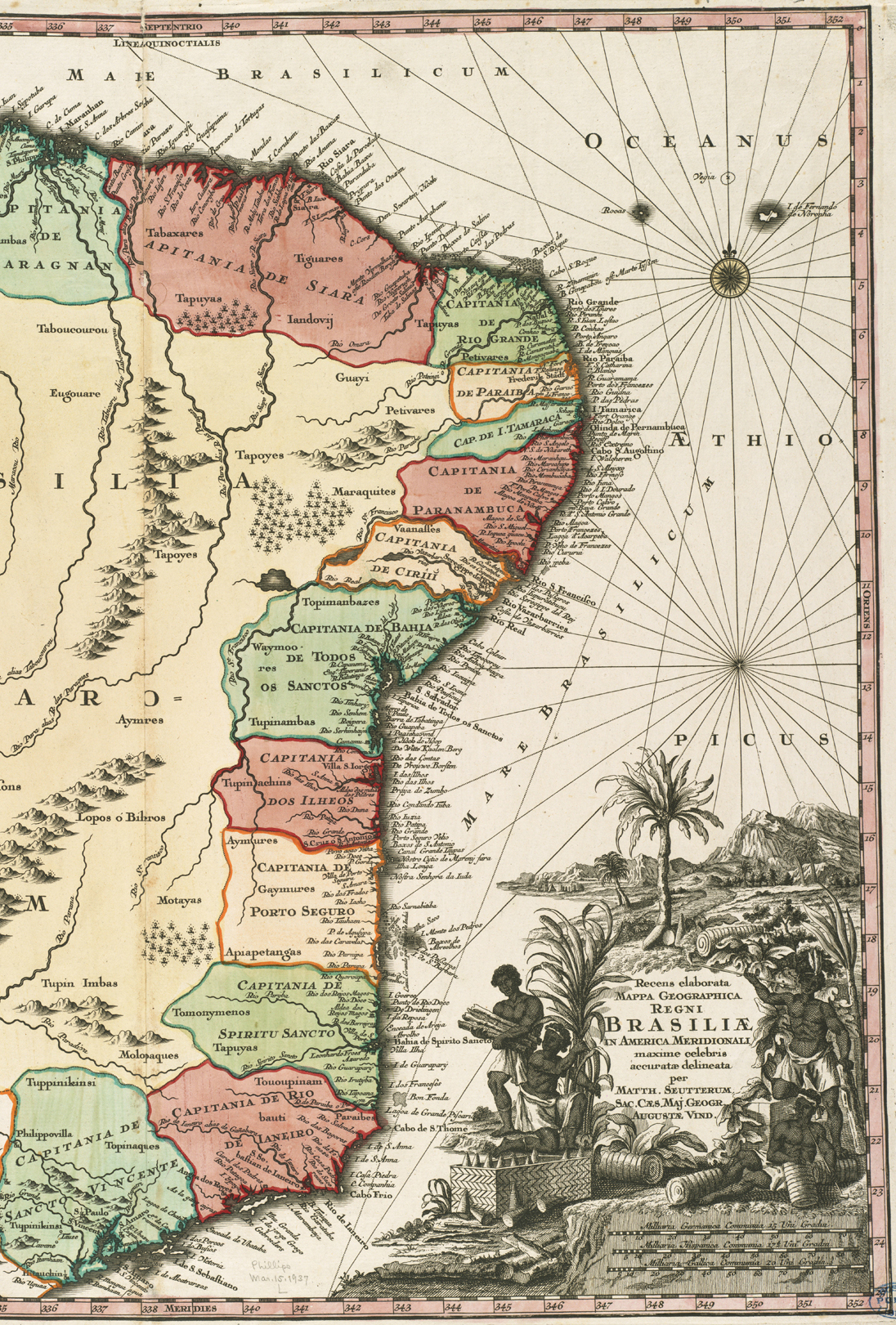 Detalle de un mapa original de Mattheus Seutter, realizado en 1730, en el que se ve la costa oriental de Brasil.